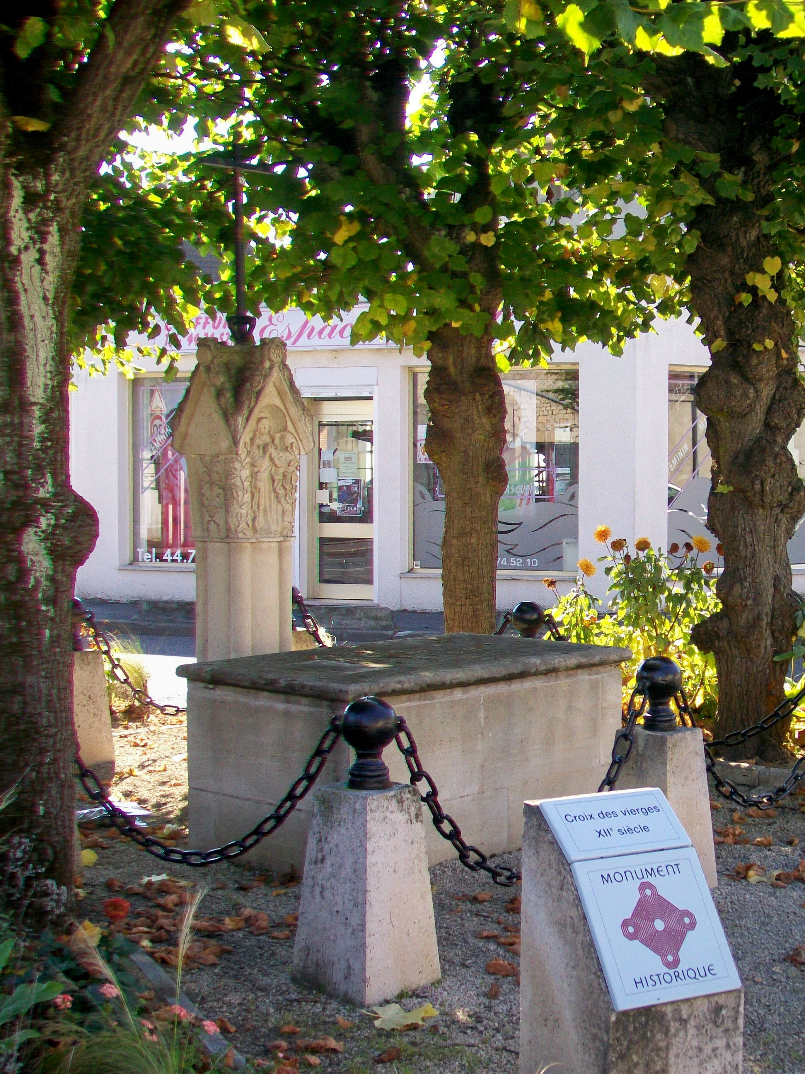 La croix des Vierges (Sainte-Maure et Sainte-Brigide, patronnes de l'église) du XIIe siècle, au carrefour des rues du général Charles-de-Gaulle et Jean-de-la-Fontaine.